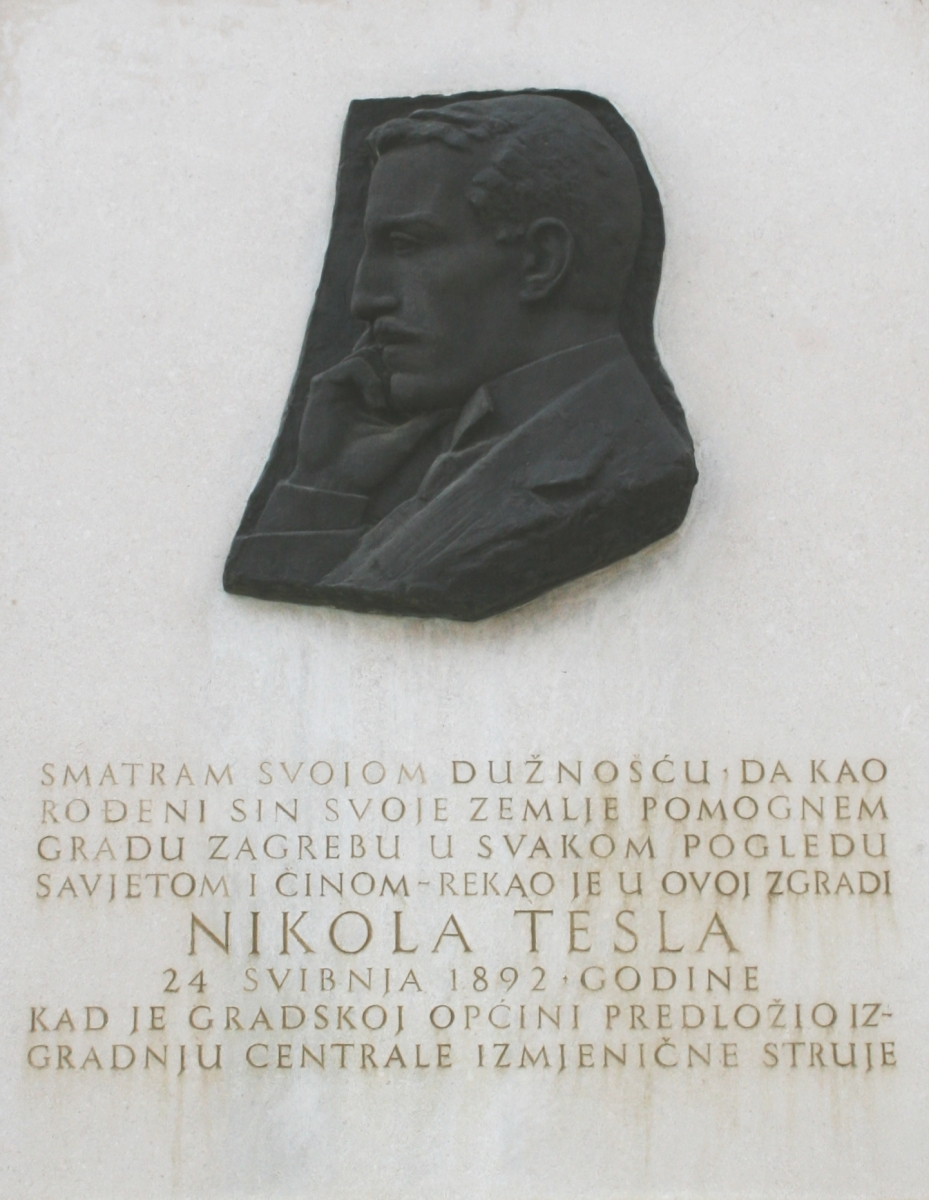 Spomen ploča Nikoli Tesli u Ćirilometodskoj 5 u Zagrebu.